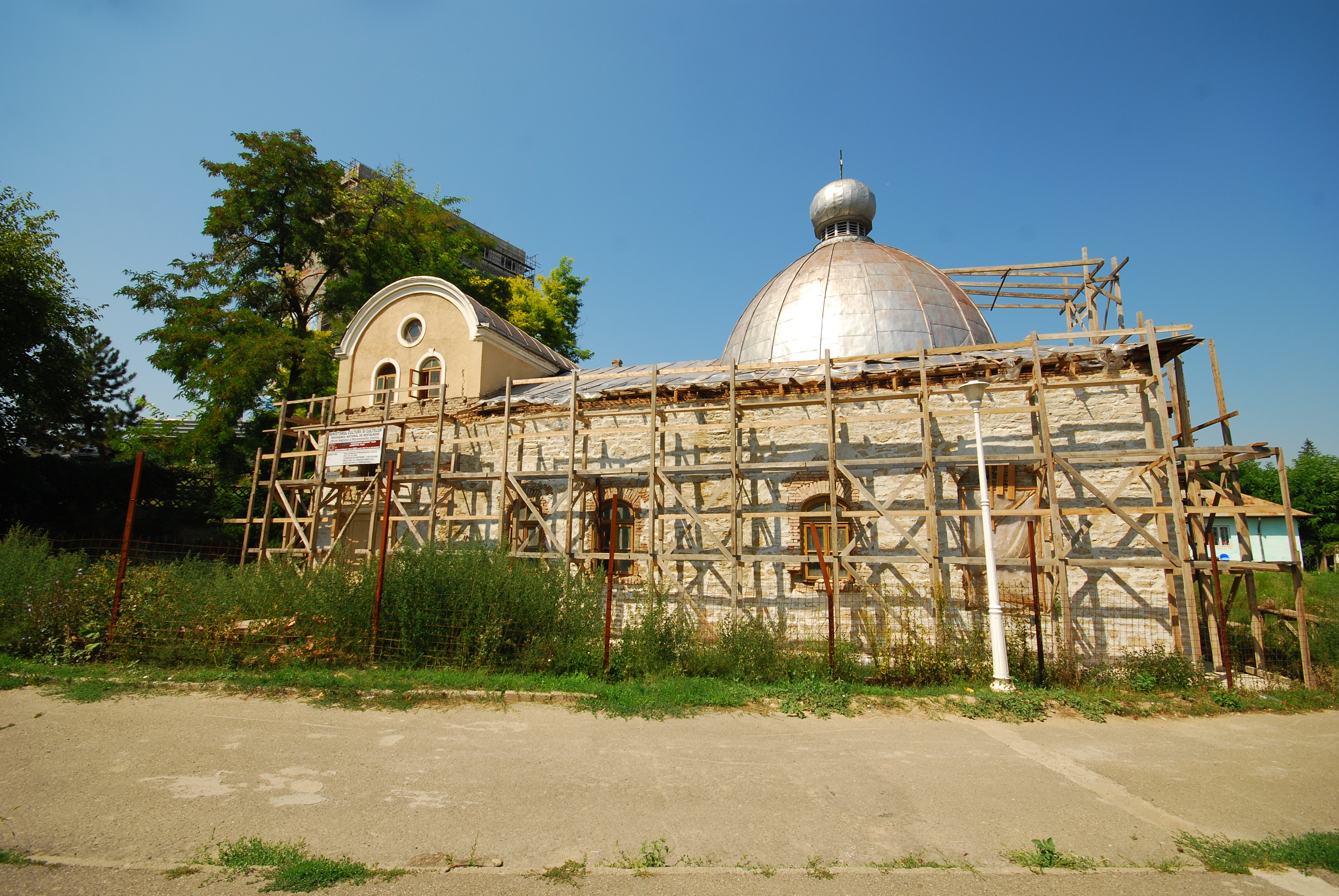 Sinagoga Mare